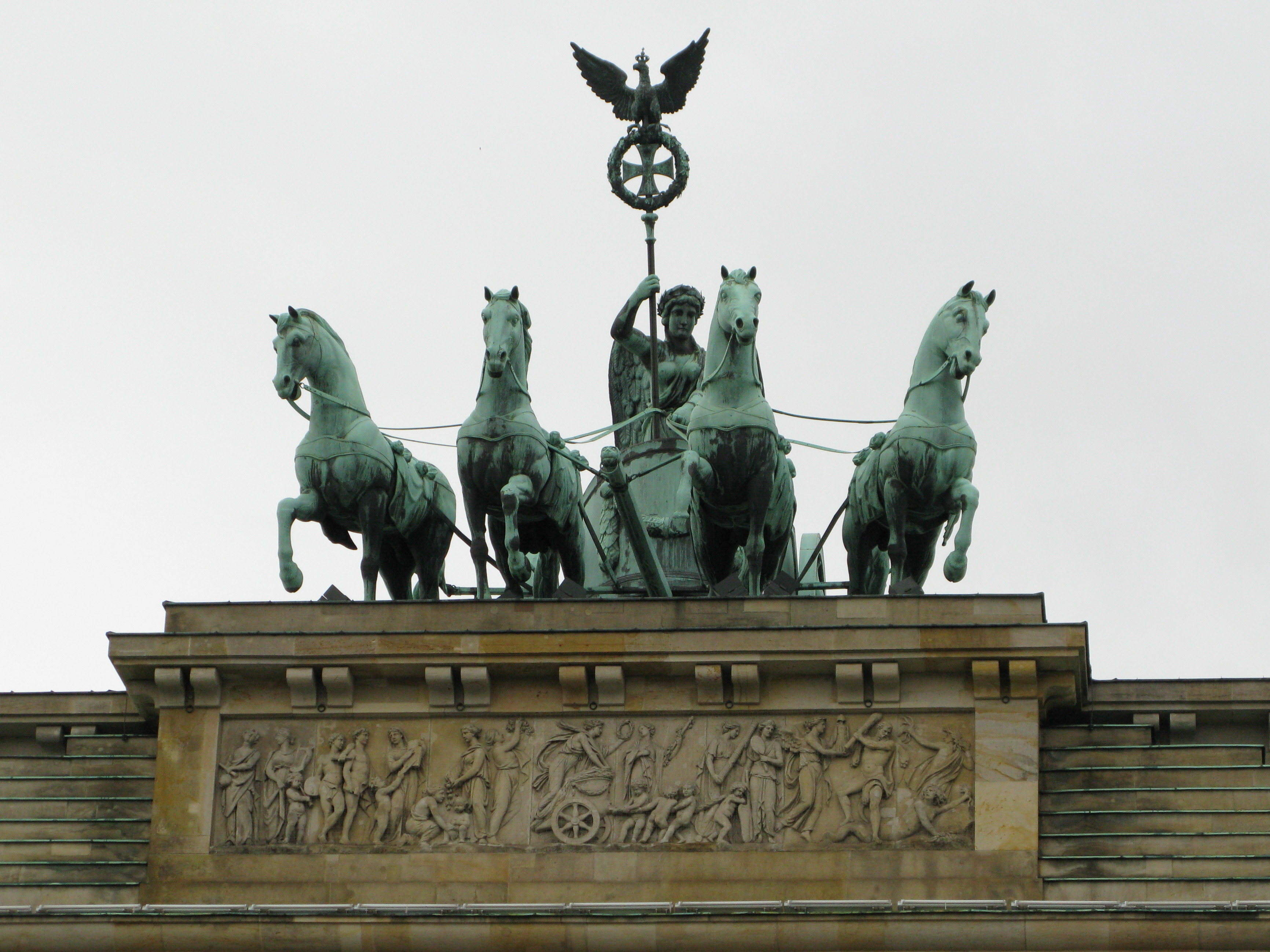 Quadriga auf dem Brandenburger Tor in BerlinThis is a photograph of an architectural monument.